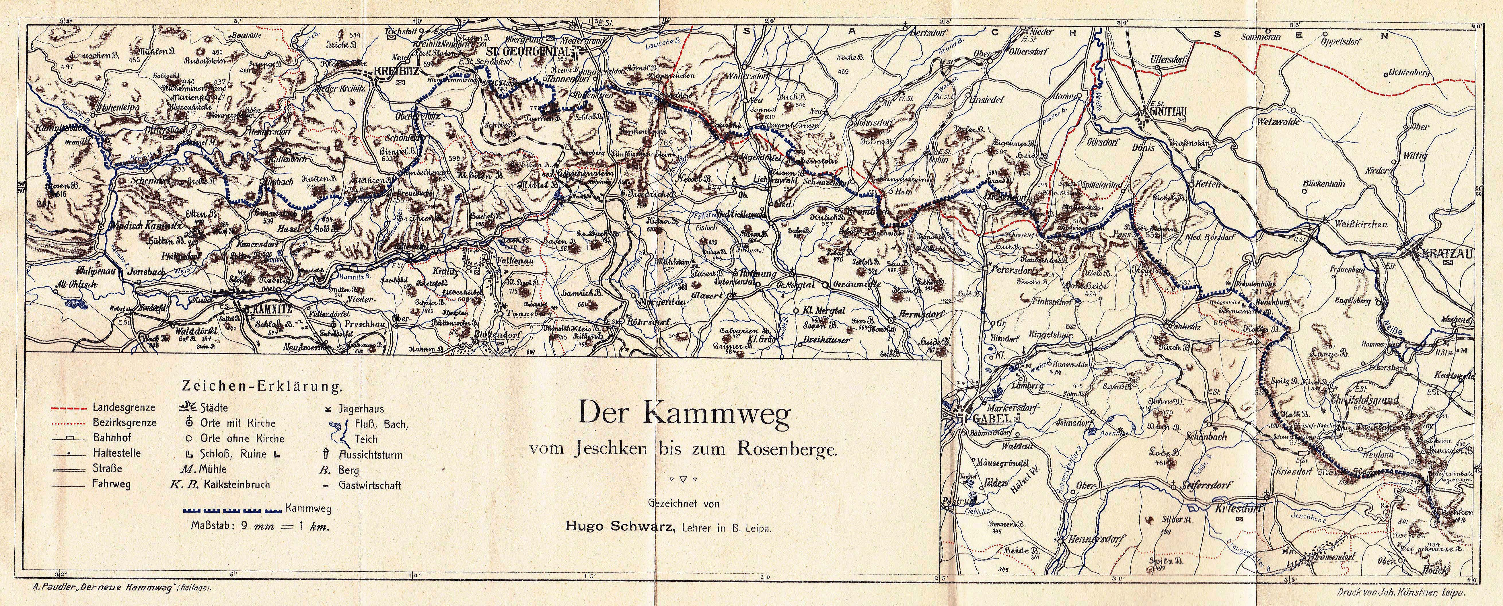 Kammweg-Karte von H. Schwarz, aus dem Buch von Anton Amand Paudler: Der Kammweg vom Jeschken zum Rosenberge, (Böhmisch) Leipa, 1904, 251 S.